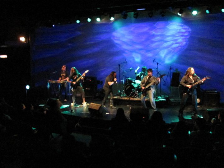 steelrage live